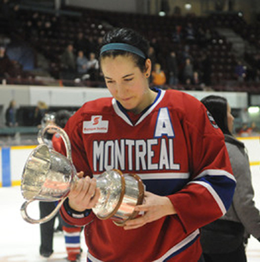 Caroline Ouellette, joueuse de hockey, Cup de Clarkson 2011